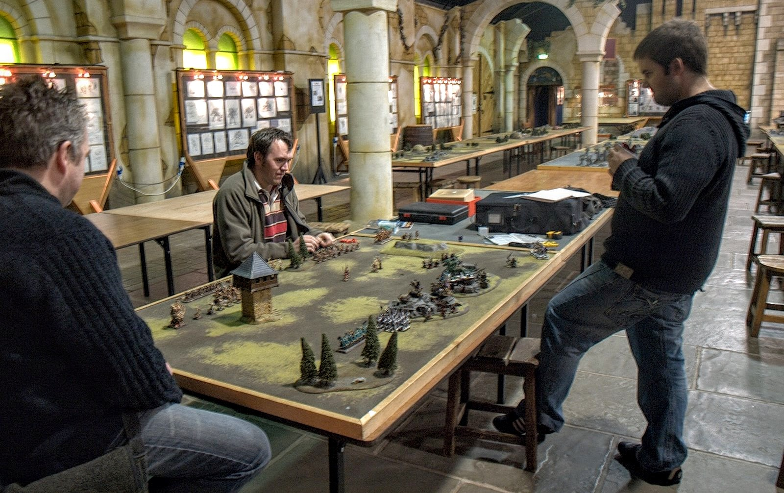 Personas jugando una partida de Warhammer dentro de las instalaciones de Games Workshop en Nottingham (Inglaterra).